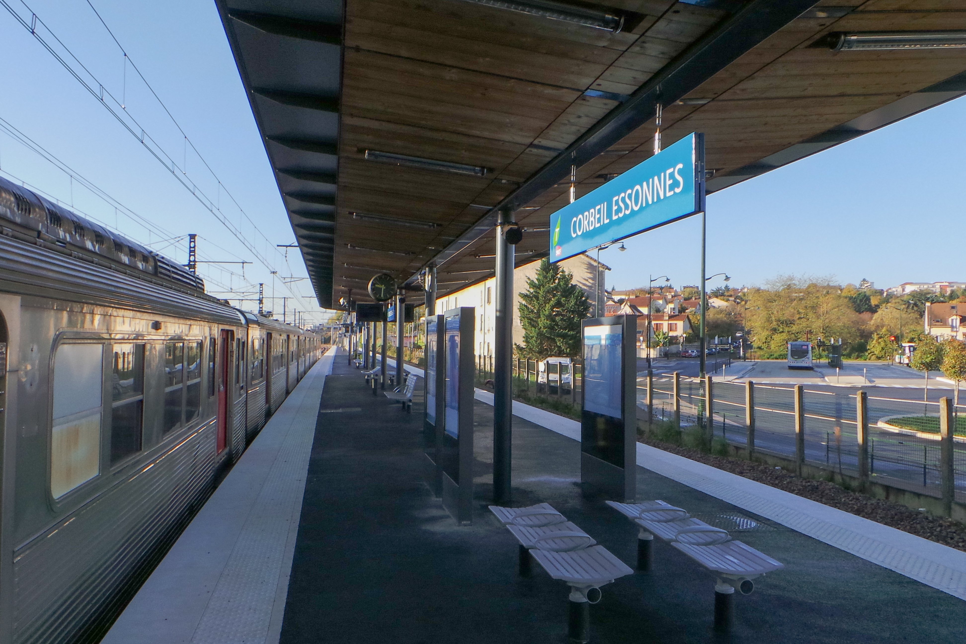 Nouveau quai n° 4 de la gare de Corbeil-Essonne / Corbeil-Essonnes, Essonne France